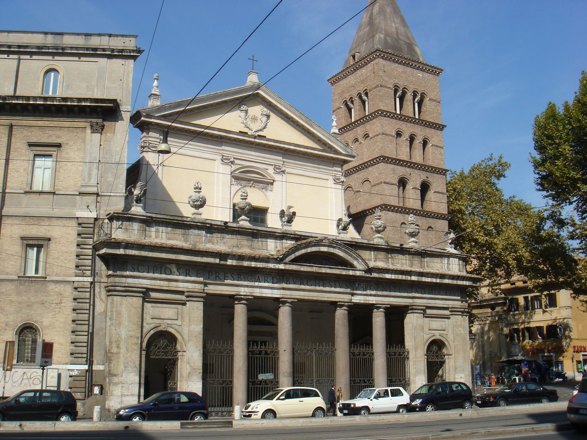 Roma, San Crisogono (Trastevere)